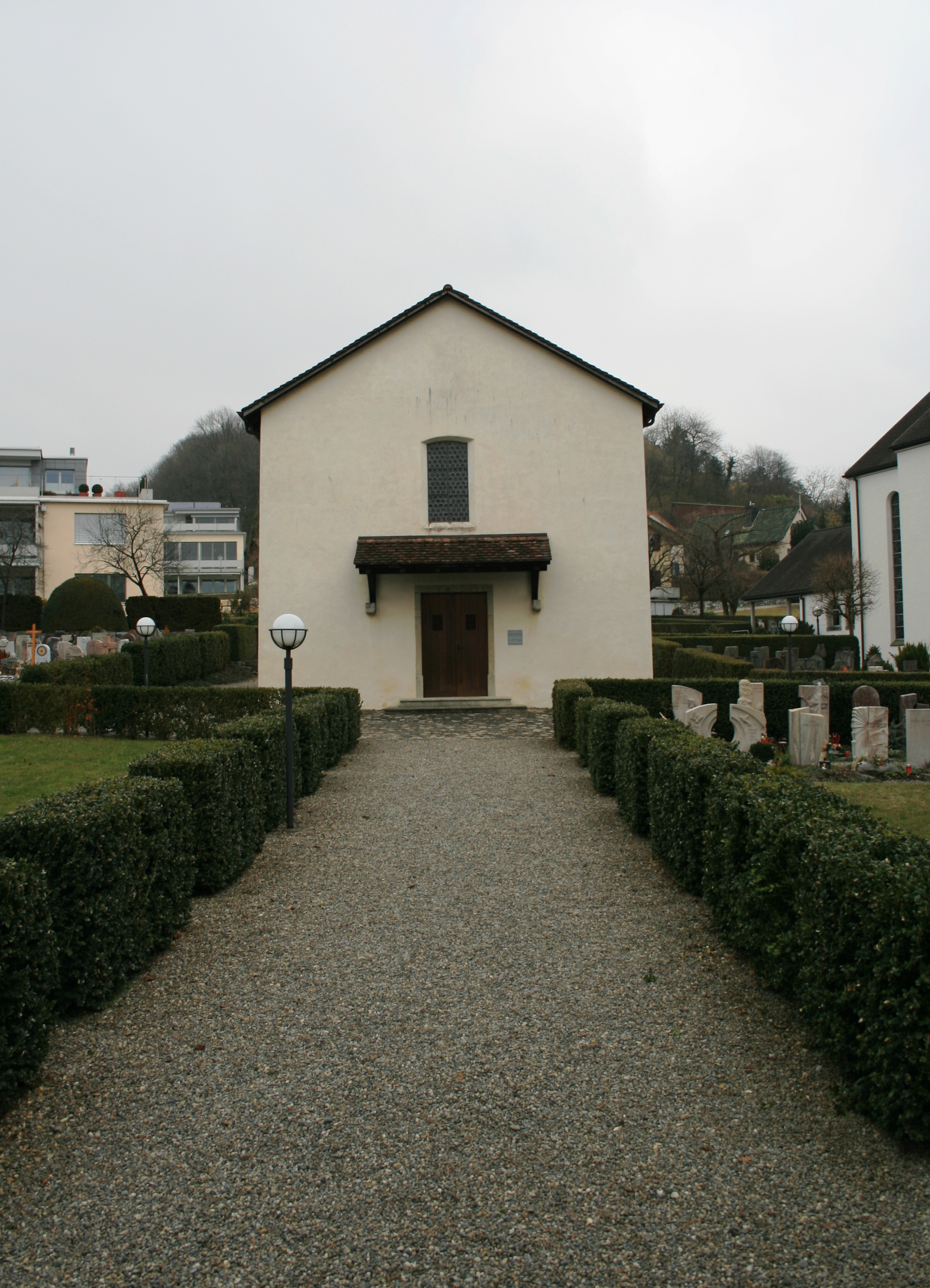 Die Freskenkapelle Birmenstorf (Friedhofskapelle)